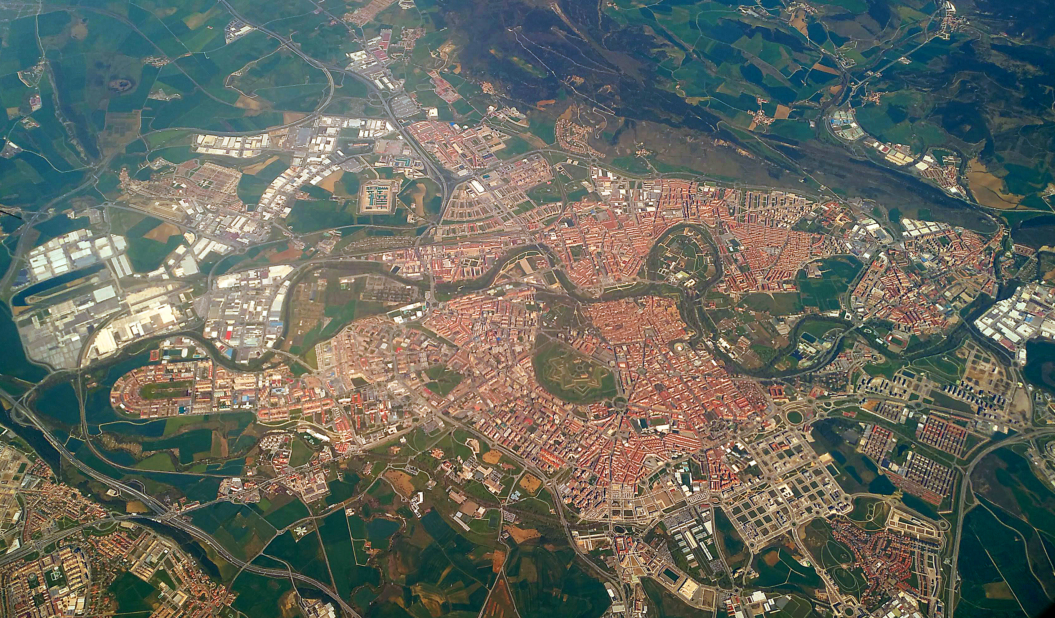 Iruñerria, hegazkin batetik ikusia. Iruñea, Barañain, Antsoain, Burlata, Atarrabia eta beste herri batzuk ere ikus daitezke.